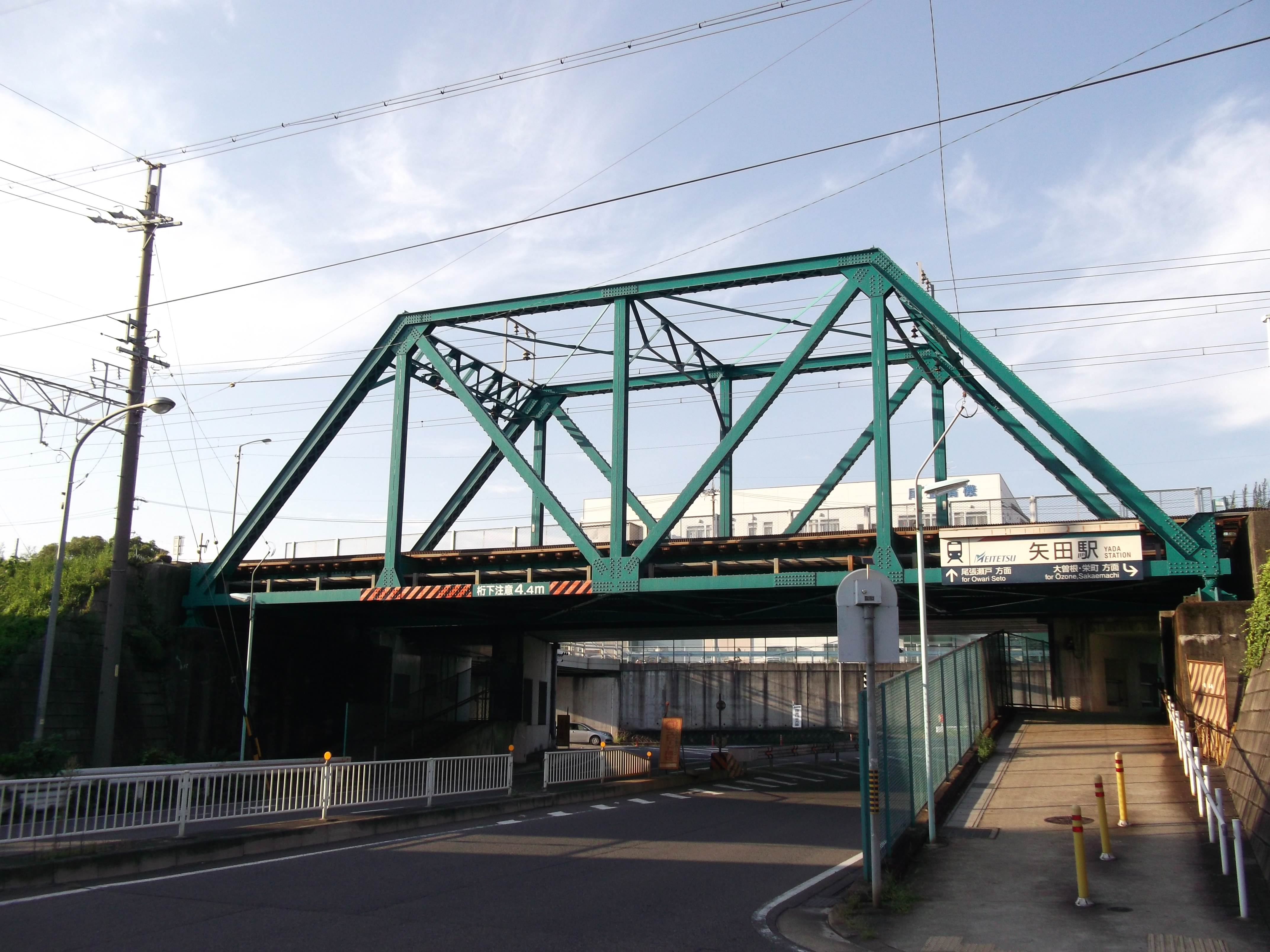 名古屋市東区の矢田橋梁を南東側より撮影